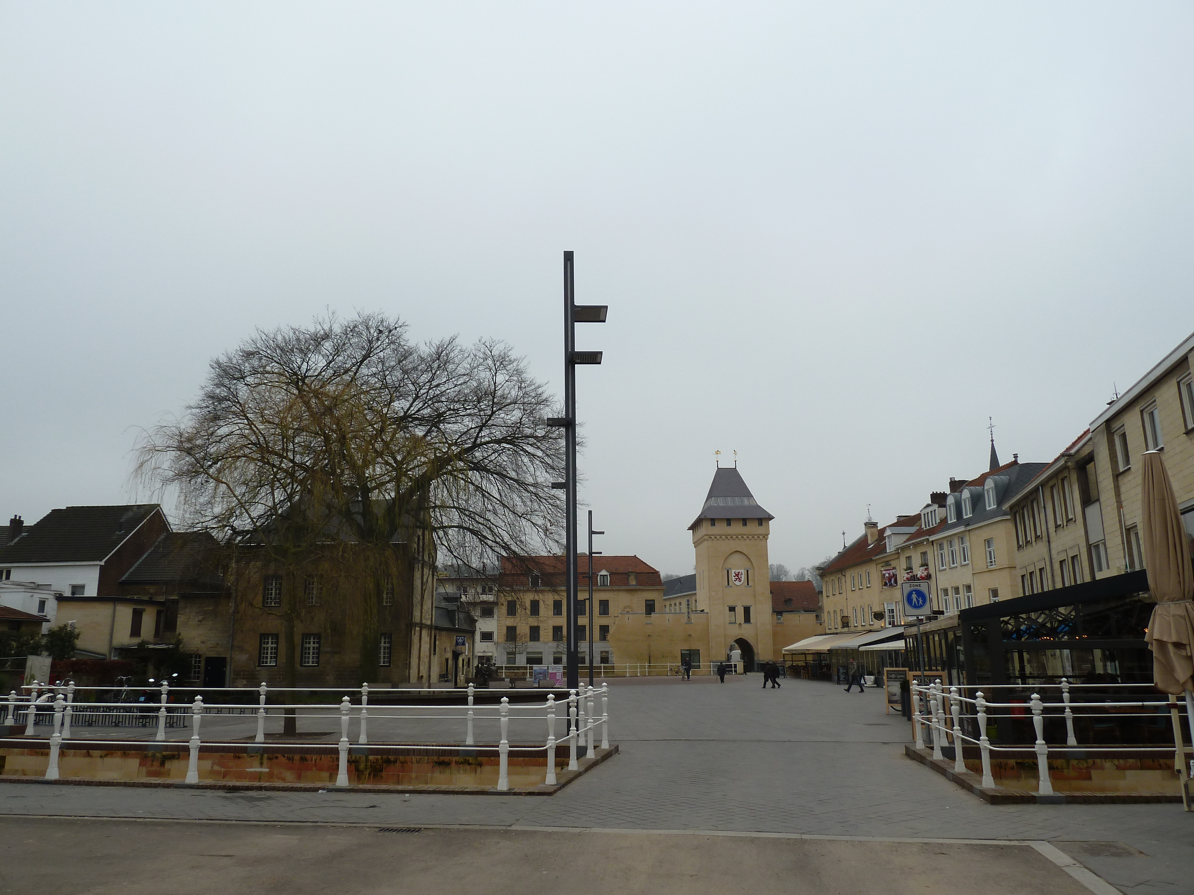 Geulpoort in Valkenburg, Limburg, Nederland